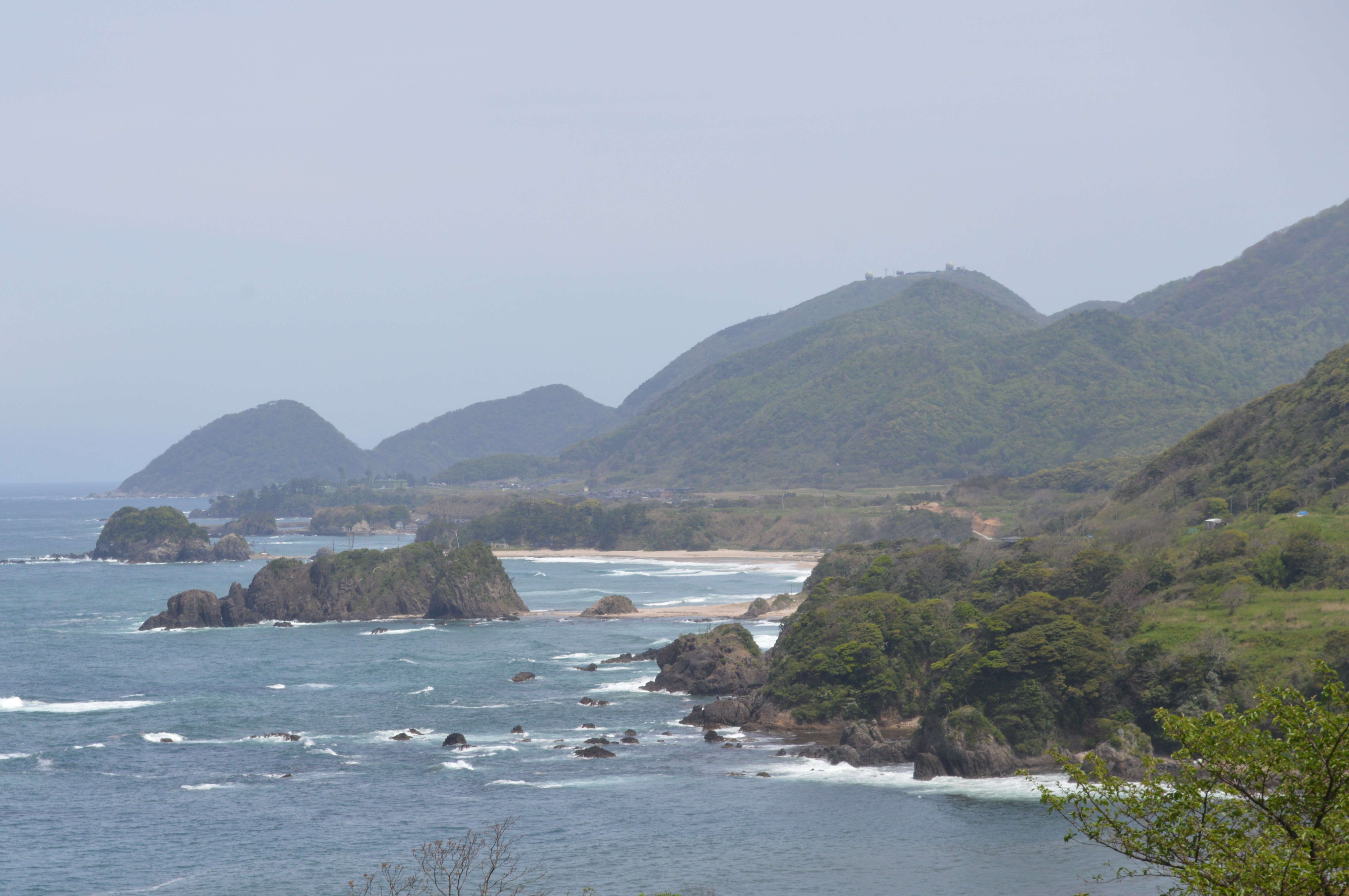 京都府京丹後市丹後町平にある丹後松島。